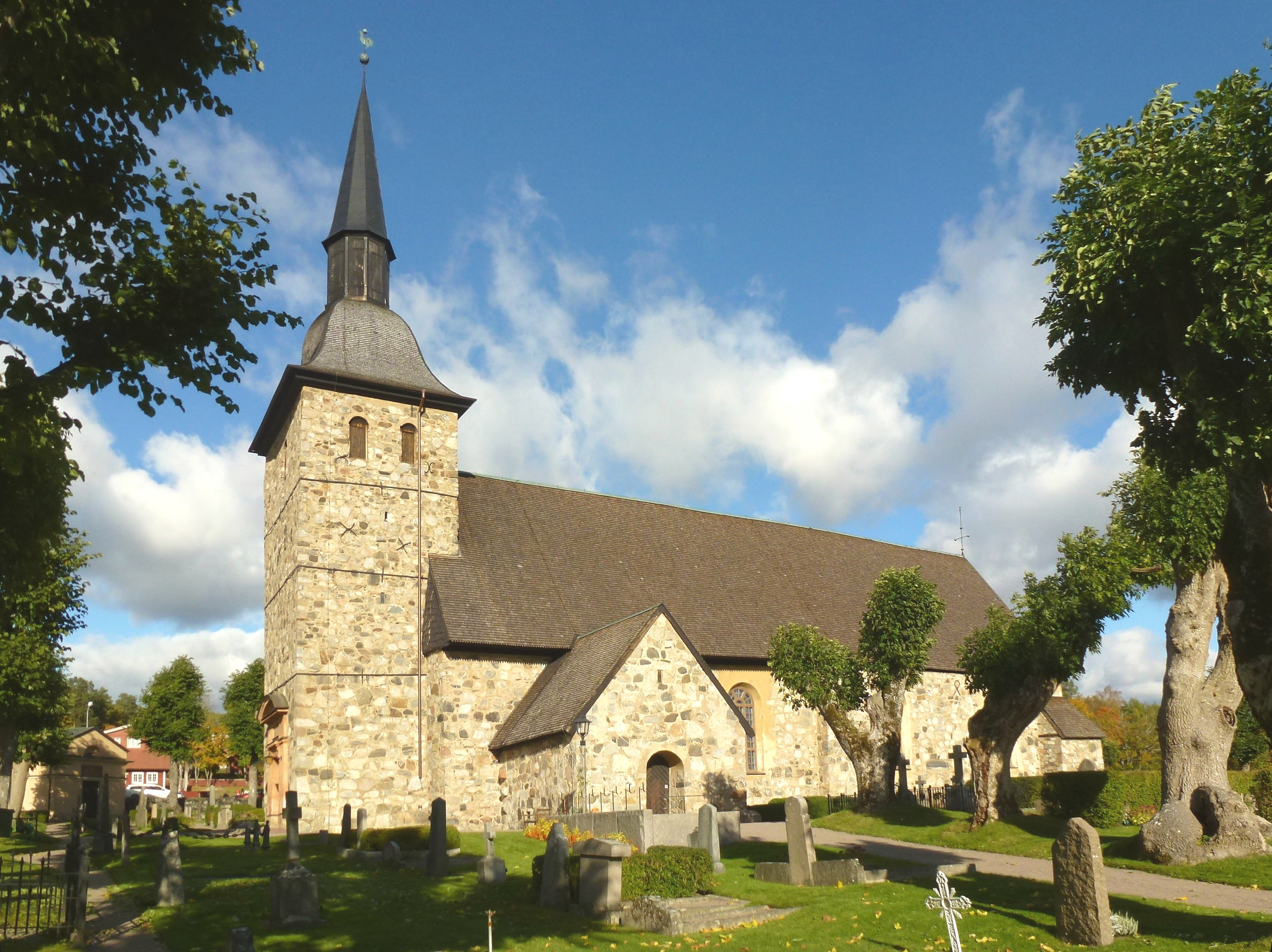 Botkyrka kyrka